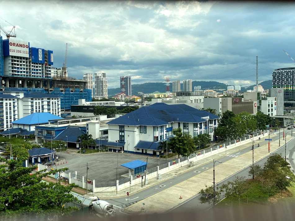 吉隆坡蕉賴的街景